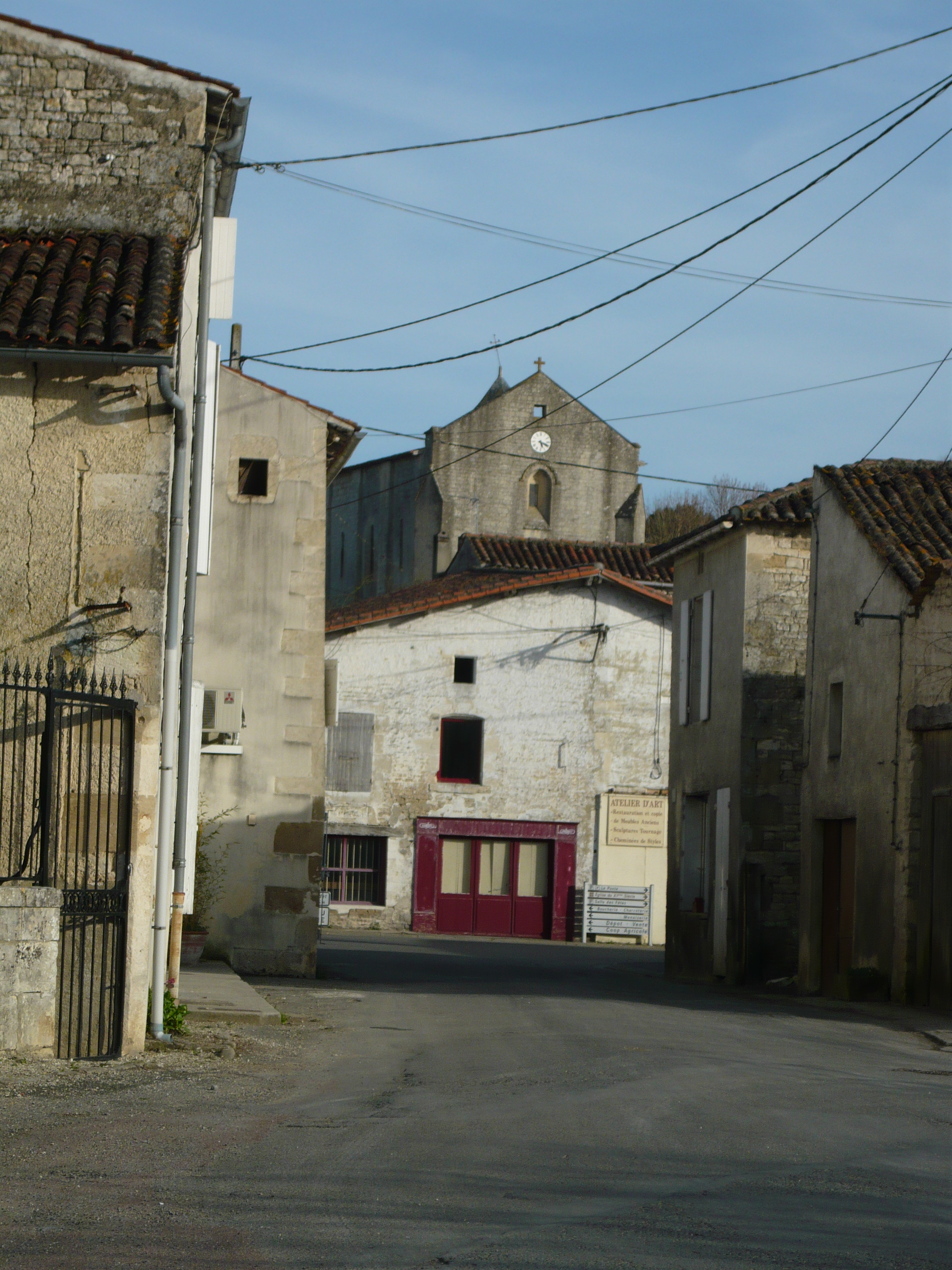 L'église de Dampierre-sur-Boutonne vue depuis la place du château